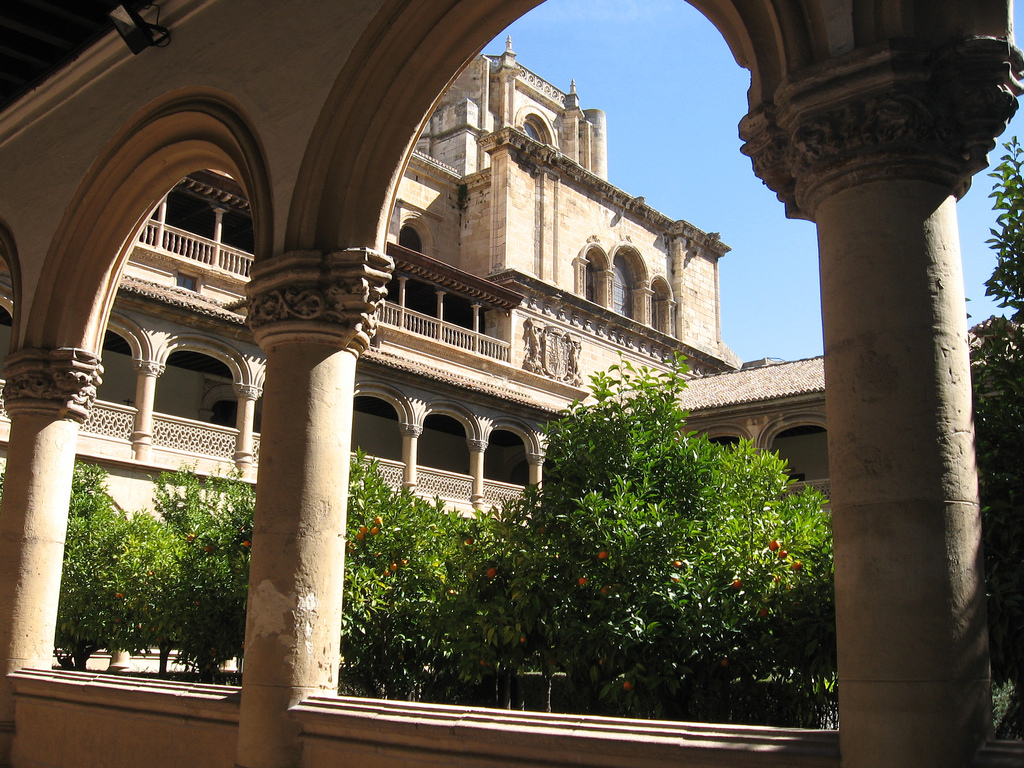 Vista desde uno de los claustros del monasterio.